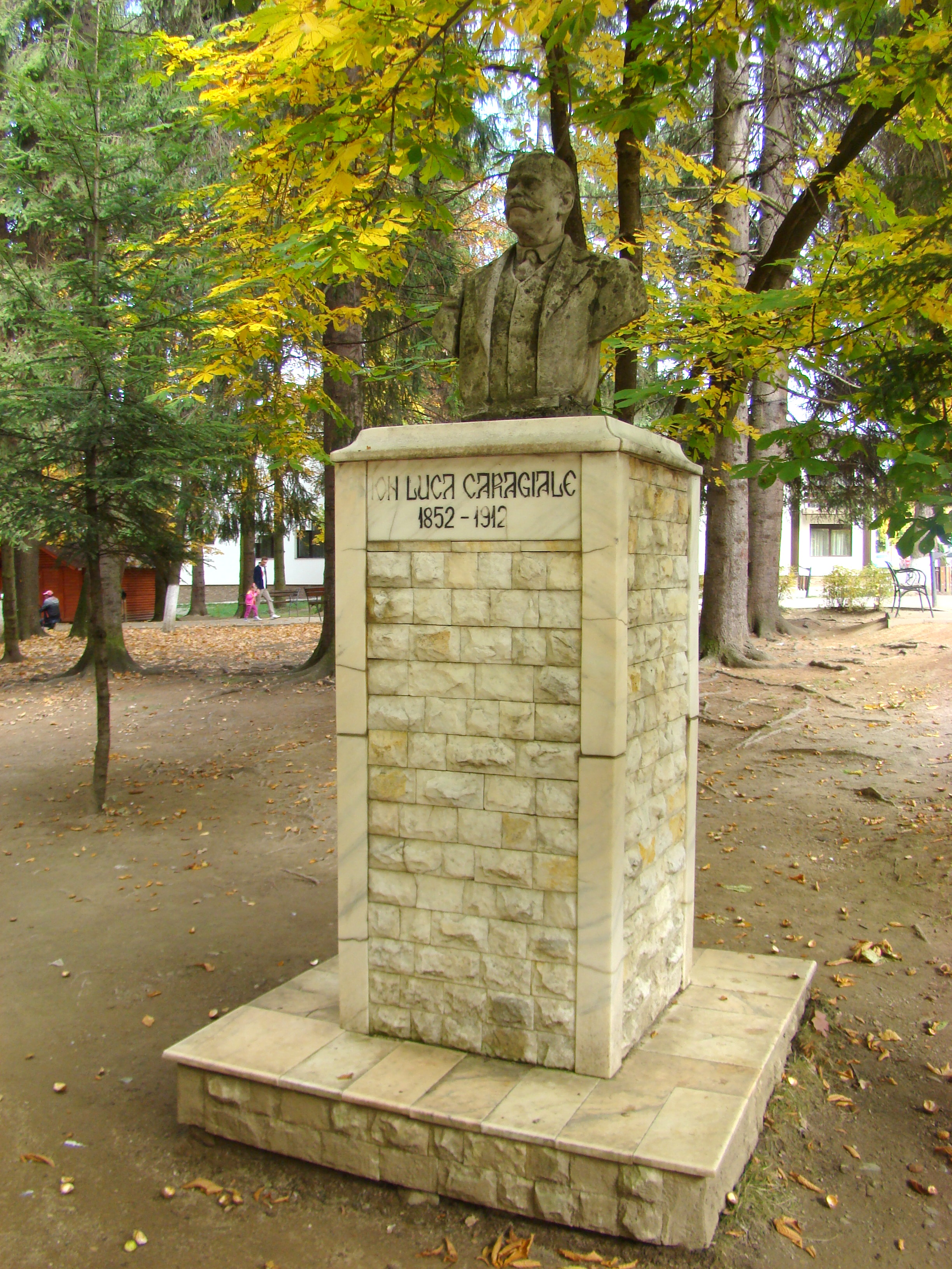 Grup statuar: Mihai Eminescu, Ion Luca Caragiale, Mihail Sadoveanu, George Enescu, Ciprian Porumbescu, Mihail Kogălniceanu, Costache Negri, Alecu Russo; municipiul Vatra Dornei, în parcul stațiunii balneare